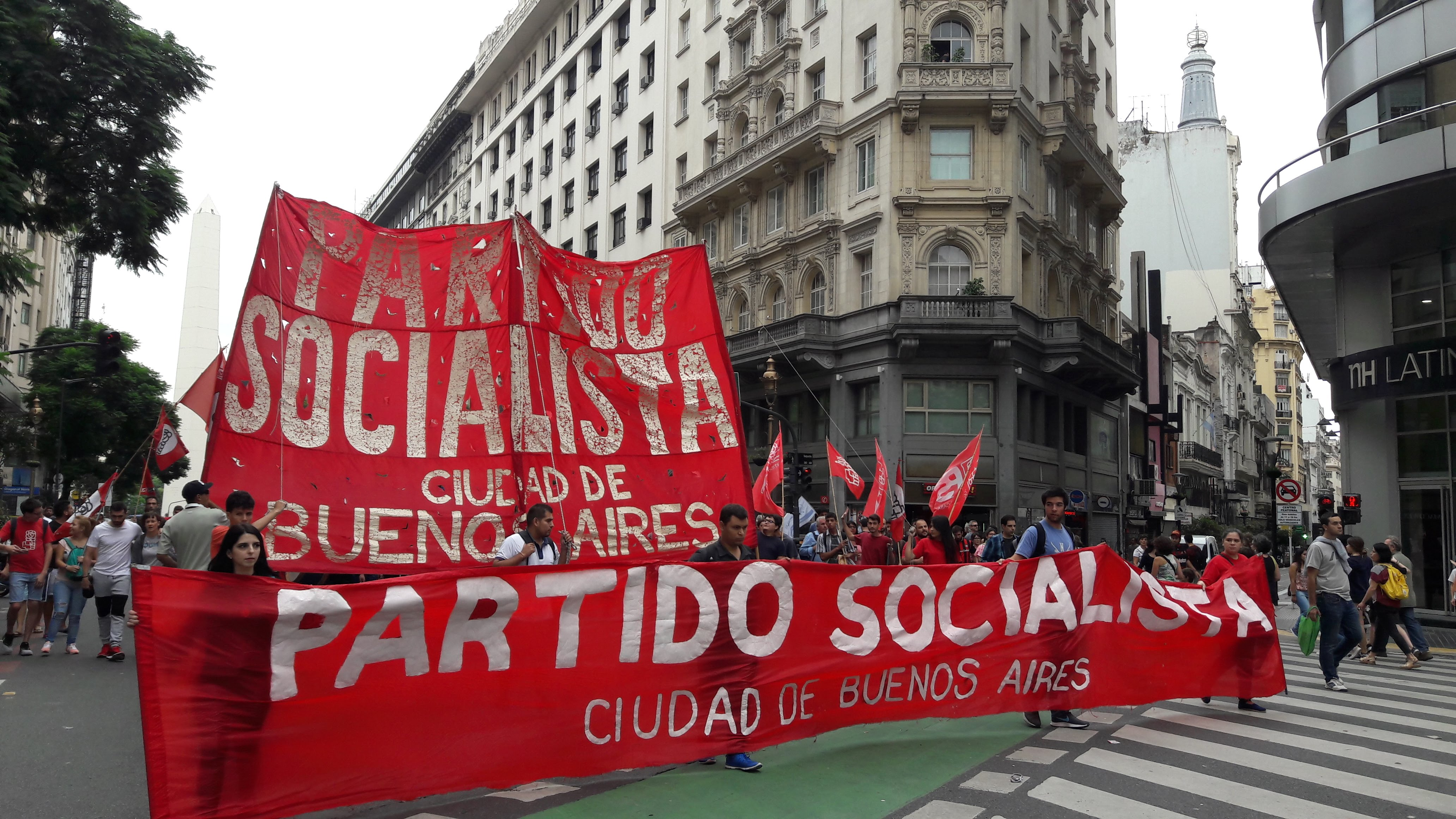 24M Marcha de la Memoria por la Verdad y Justicia en Buenos Aires, Argentina.